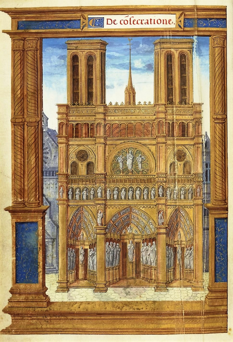 Notre-Dame-de-Paris, dans Pontifical romain aux armes de Jean II de Mauléon, évêque de Saint-Bertrand-de Comminges, BnF, Ms. Latin 1226-2